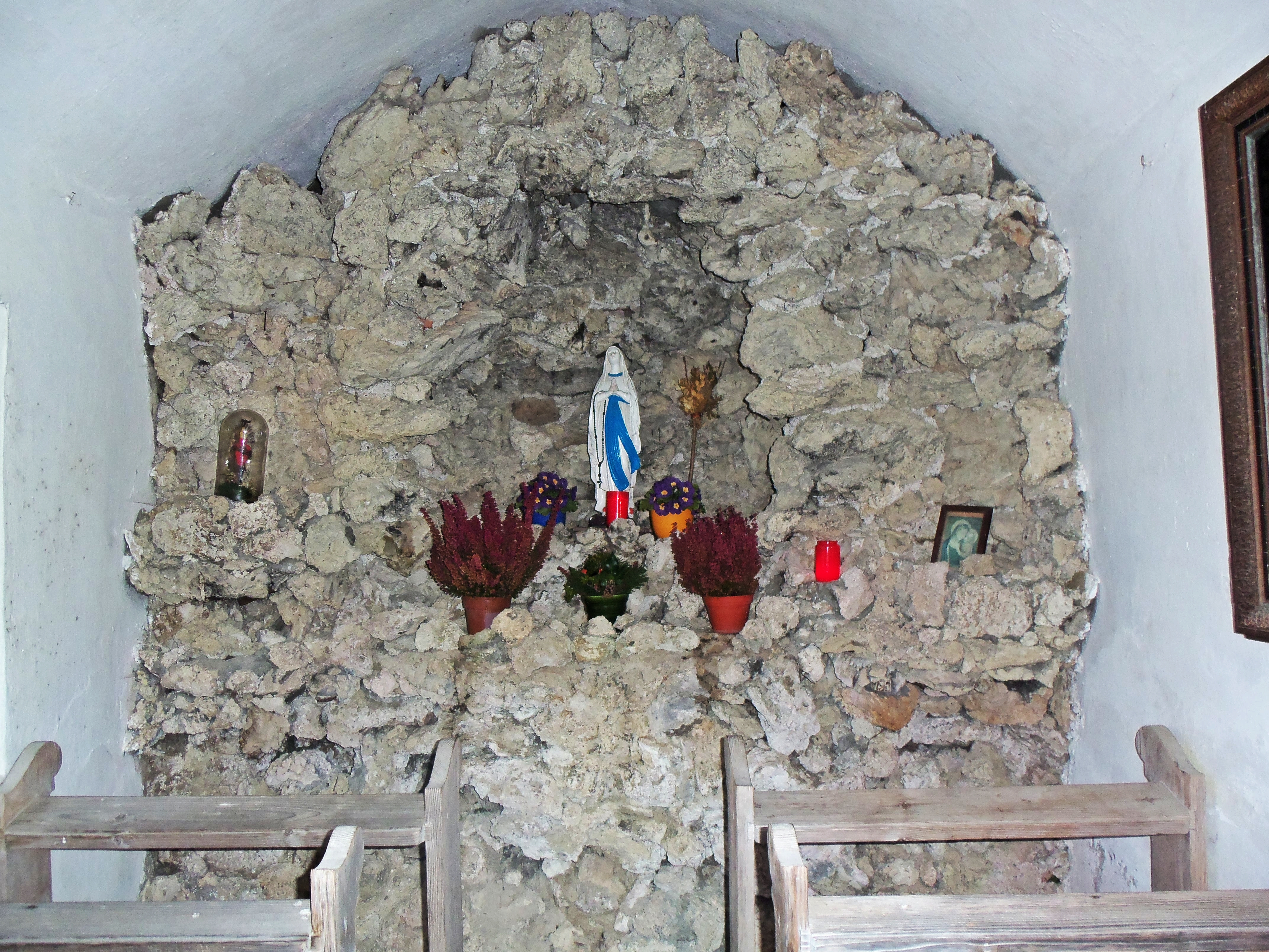 Rabenwies Kirche von Inneren